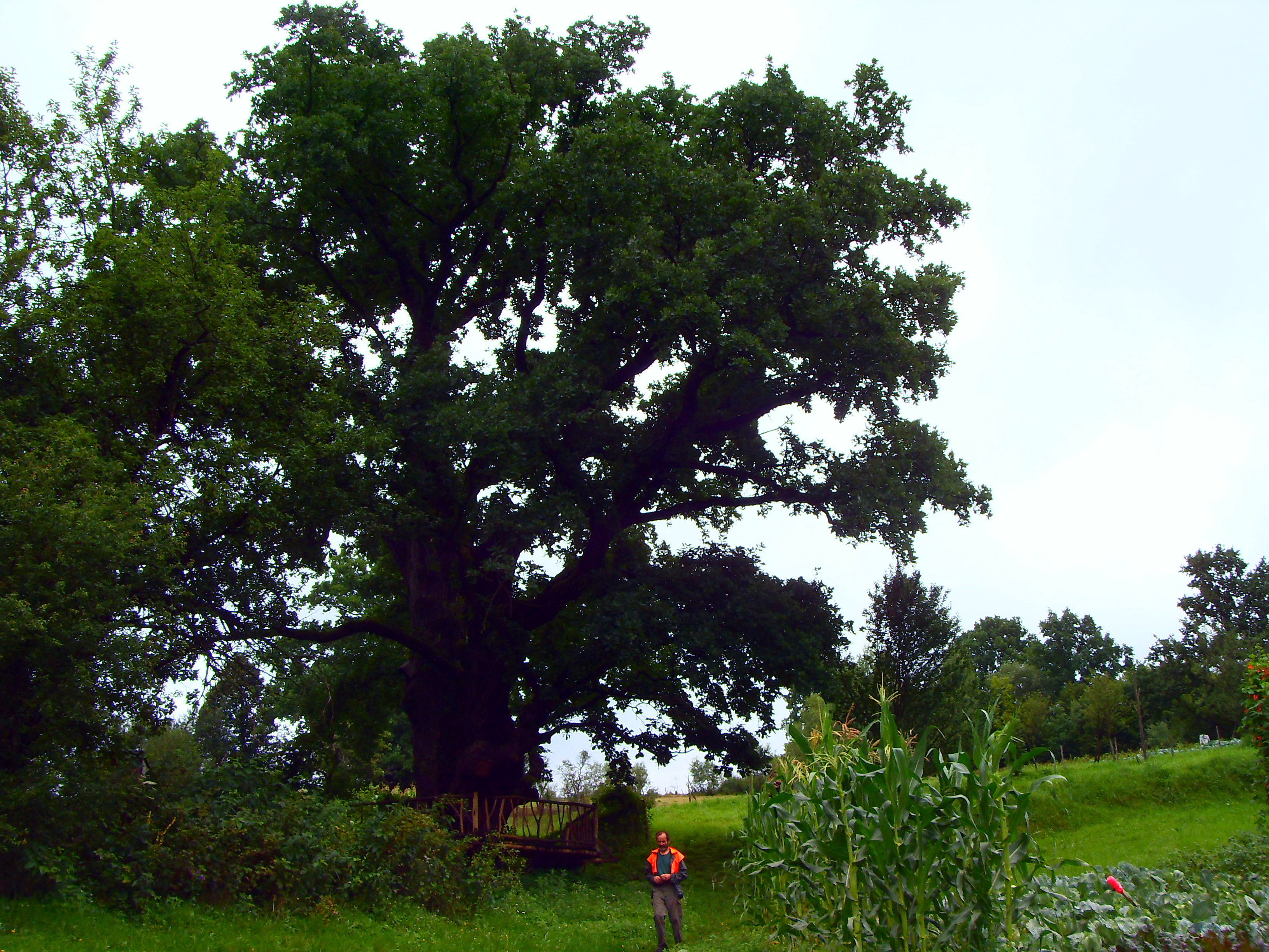 «Дуб звичайний», Великоберезнянський р-н, с. Ст. Стужиця